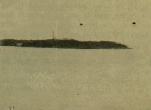 Faro Isla Felix en el estrecho, foto publicada en 1916